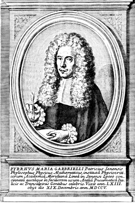 Ritratto di Pirro Maria Gabbrielli